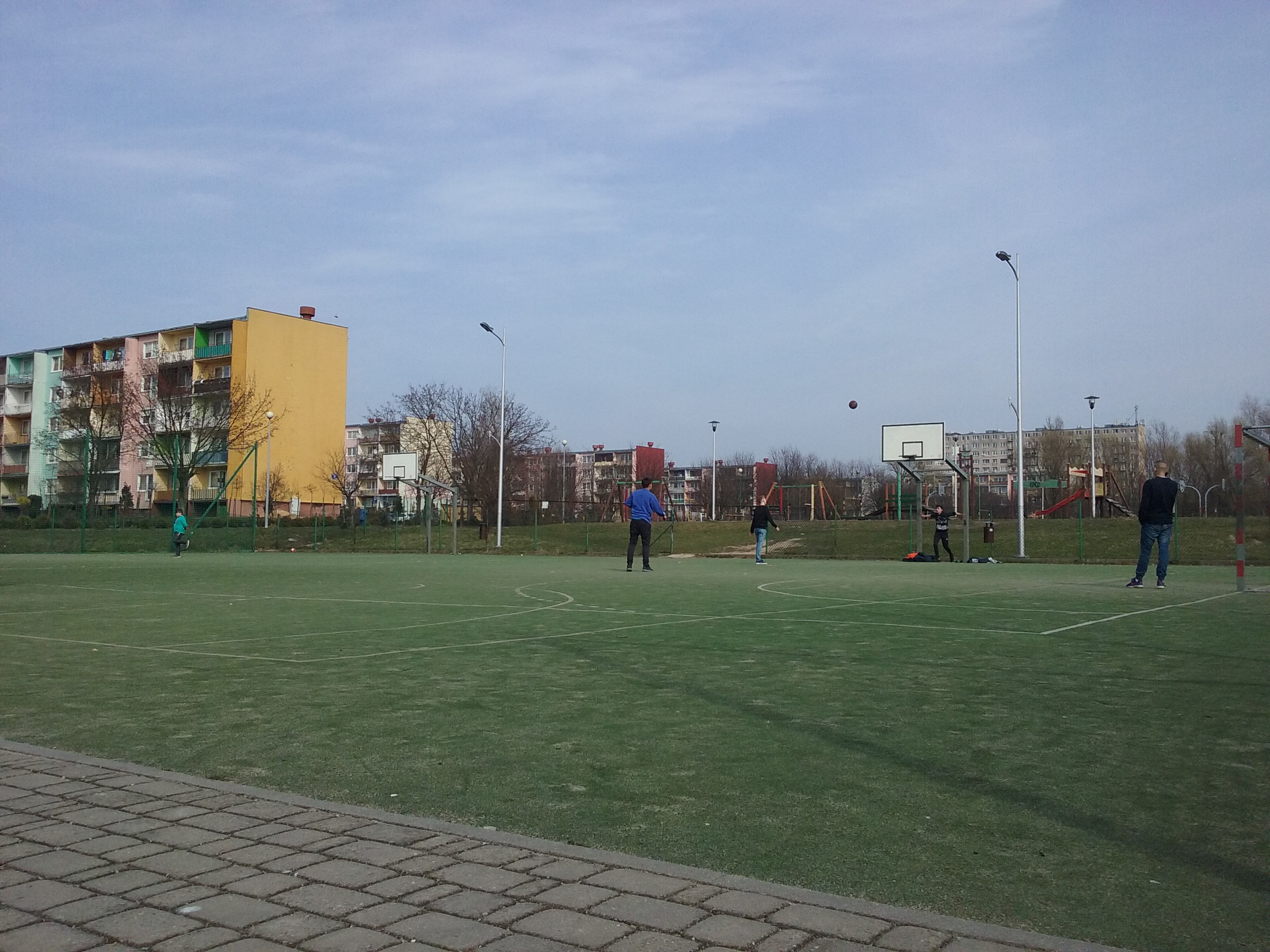 Tomaszów Mazowiecki w województwie łódzkim PL, EU. Ogólnodostępne dla mieszkańców miasta boisko szkolne przy Szkole Podstawowej nr 10 na największym tomaszowskim osiedlu mieszkaniowym - Niebrów. CC0